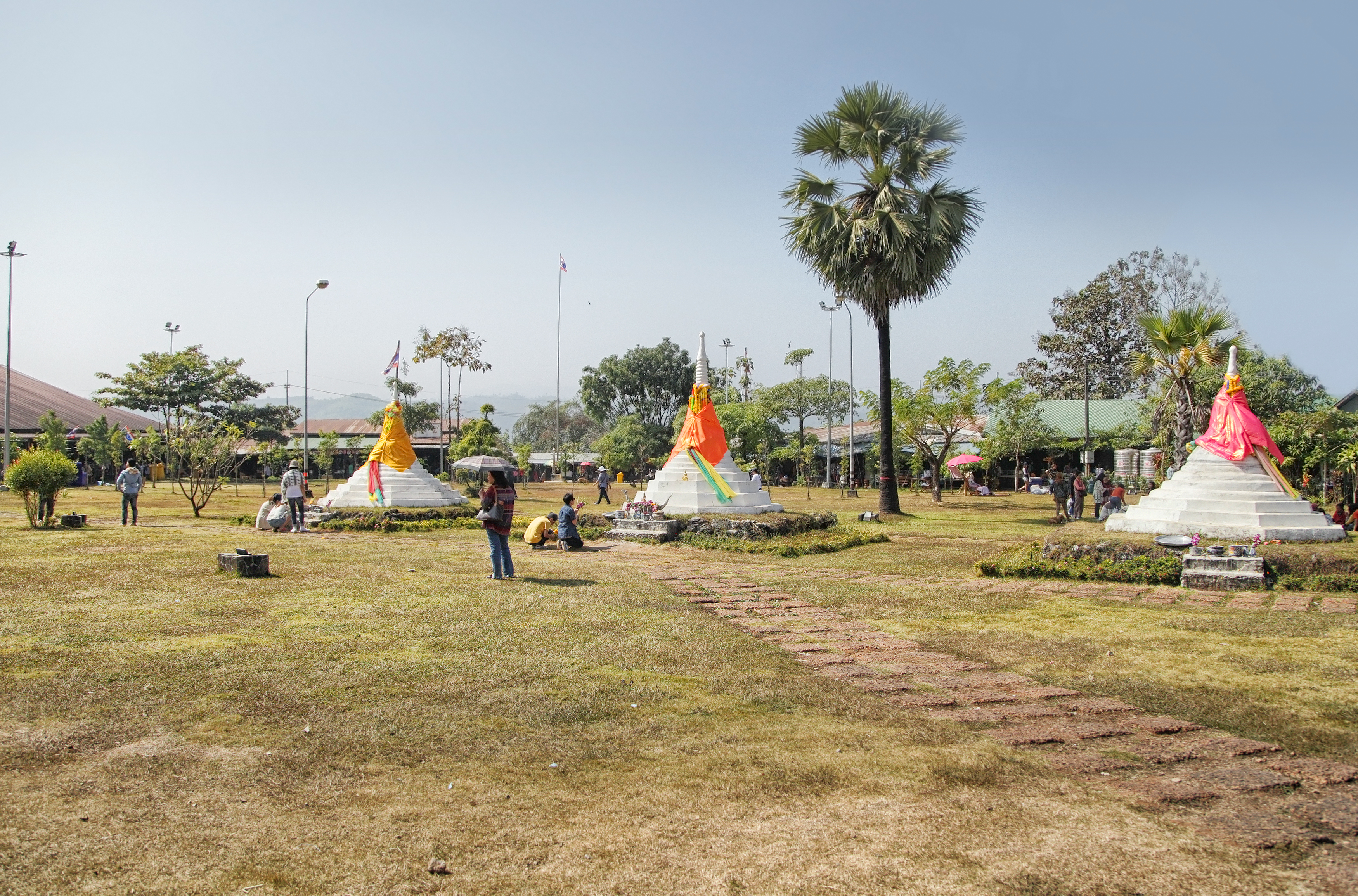 พระเจดีย์สามองค์